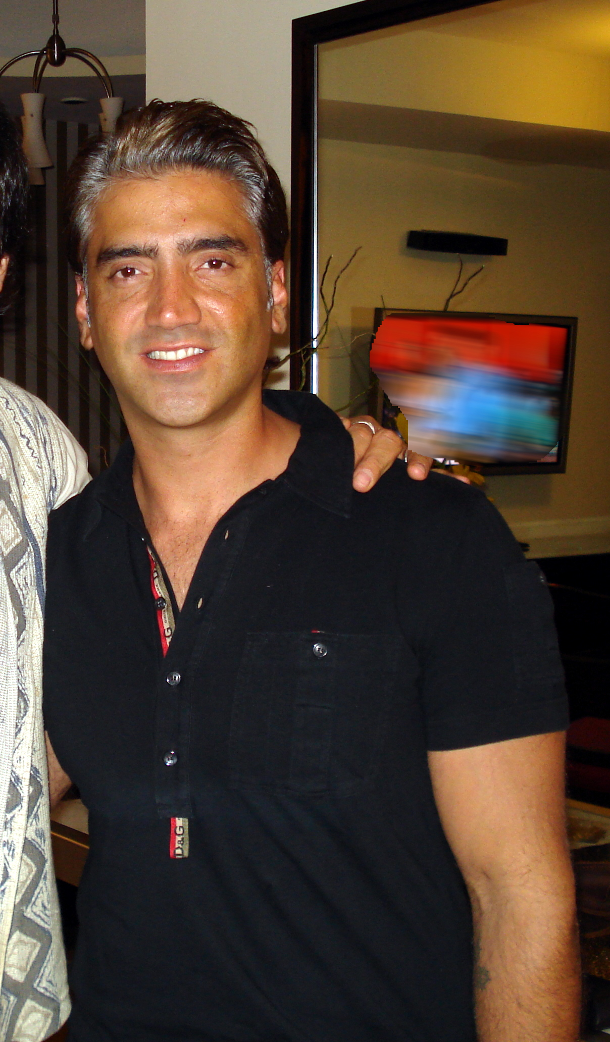 Alejandro Fernandez